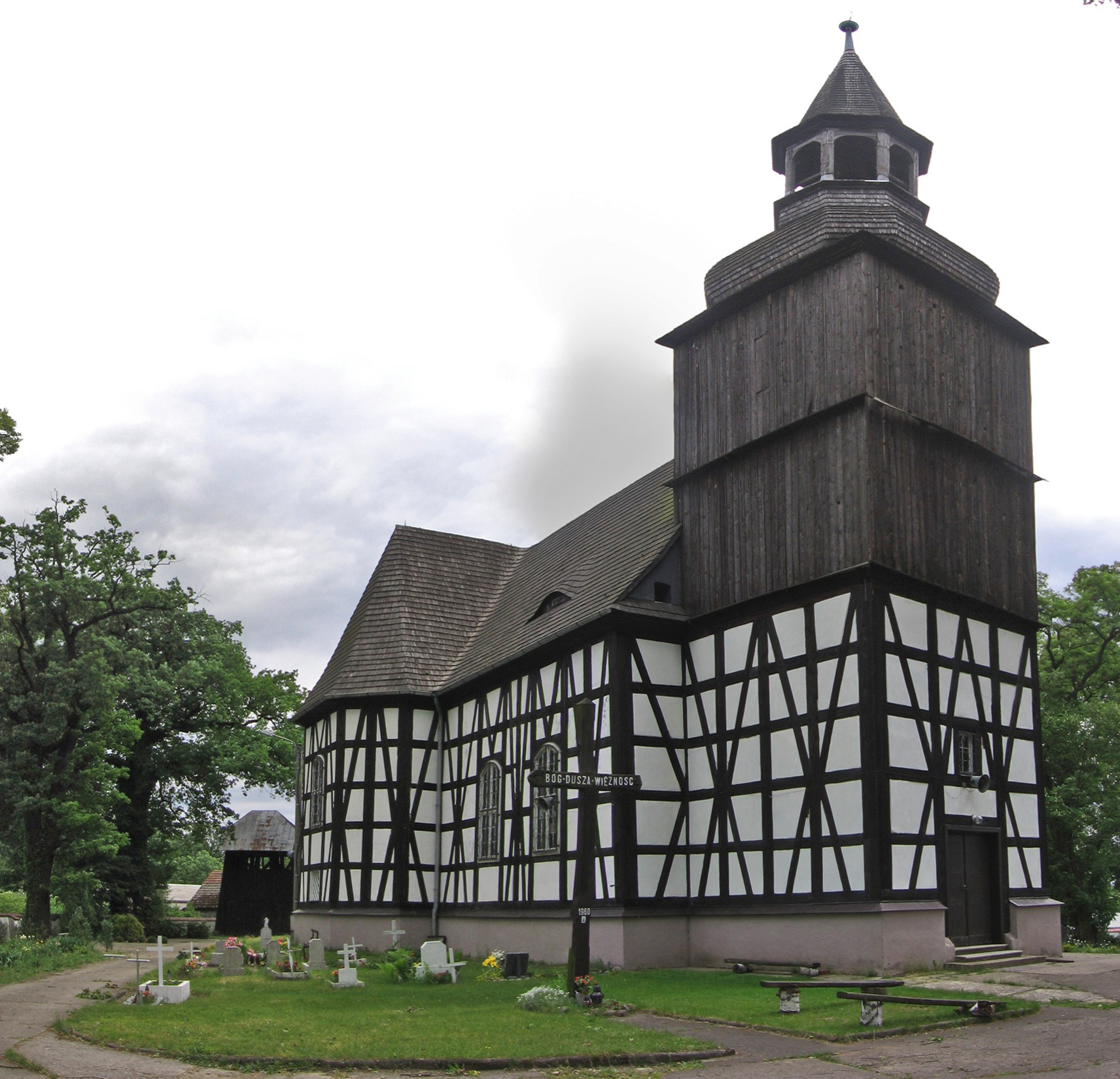 kościół św. Piotra i Pawła w Sułowie k. Milicza (woj. dolnośląskie)